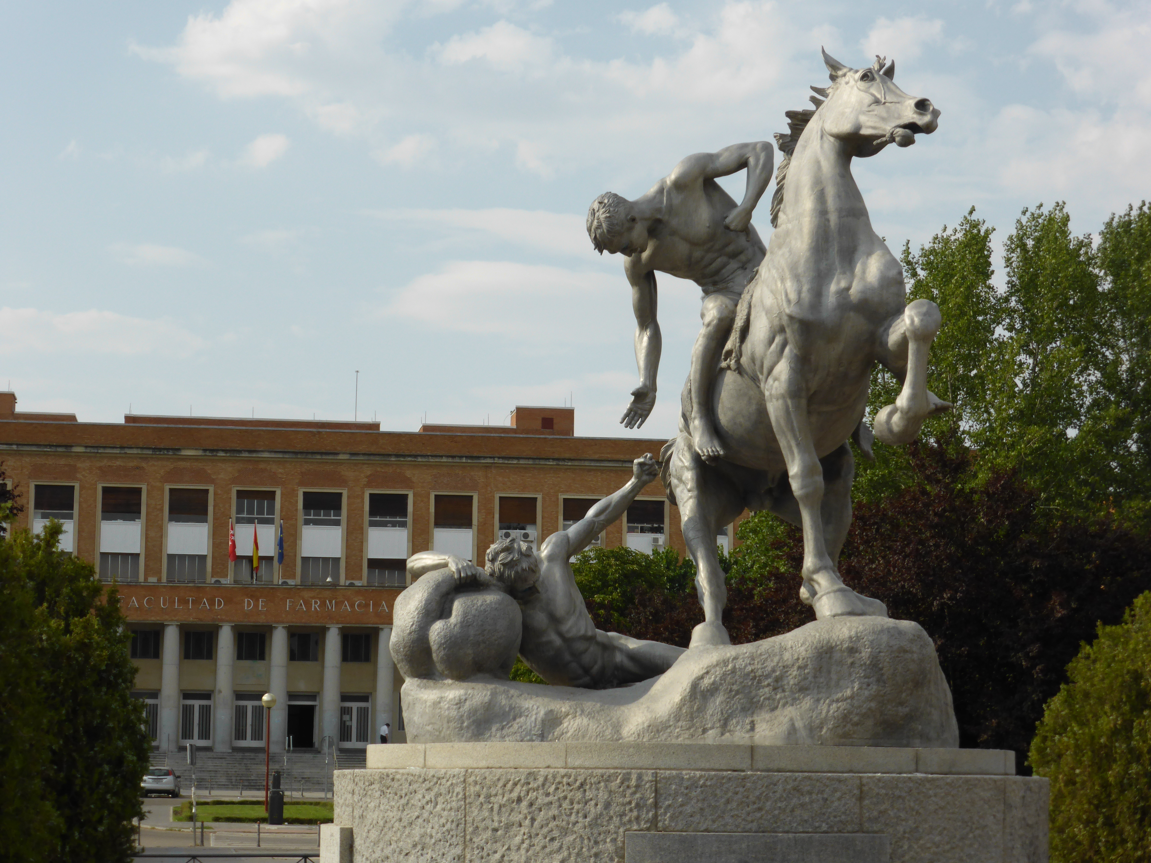 Muy cerca de una de las bocas del Metro "Ciudad Universitaria" se encuentra esta escultura alegórica titulada "Los portadores de la antorcha", que representa la transmisión del conocimiento. En estos momentos a la escultura le han robado la antorcha. A lo lejos se ve la Facultad de Farmacia.